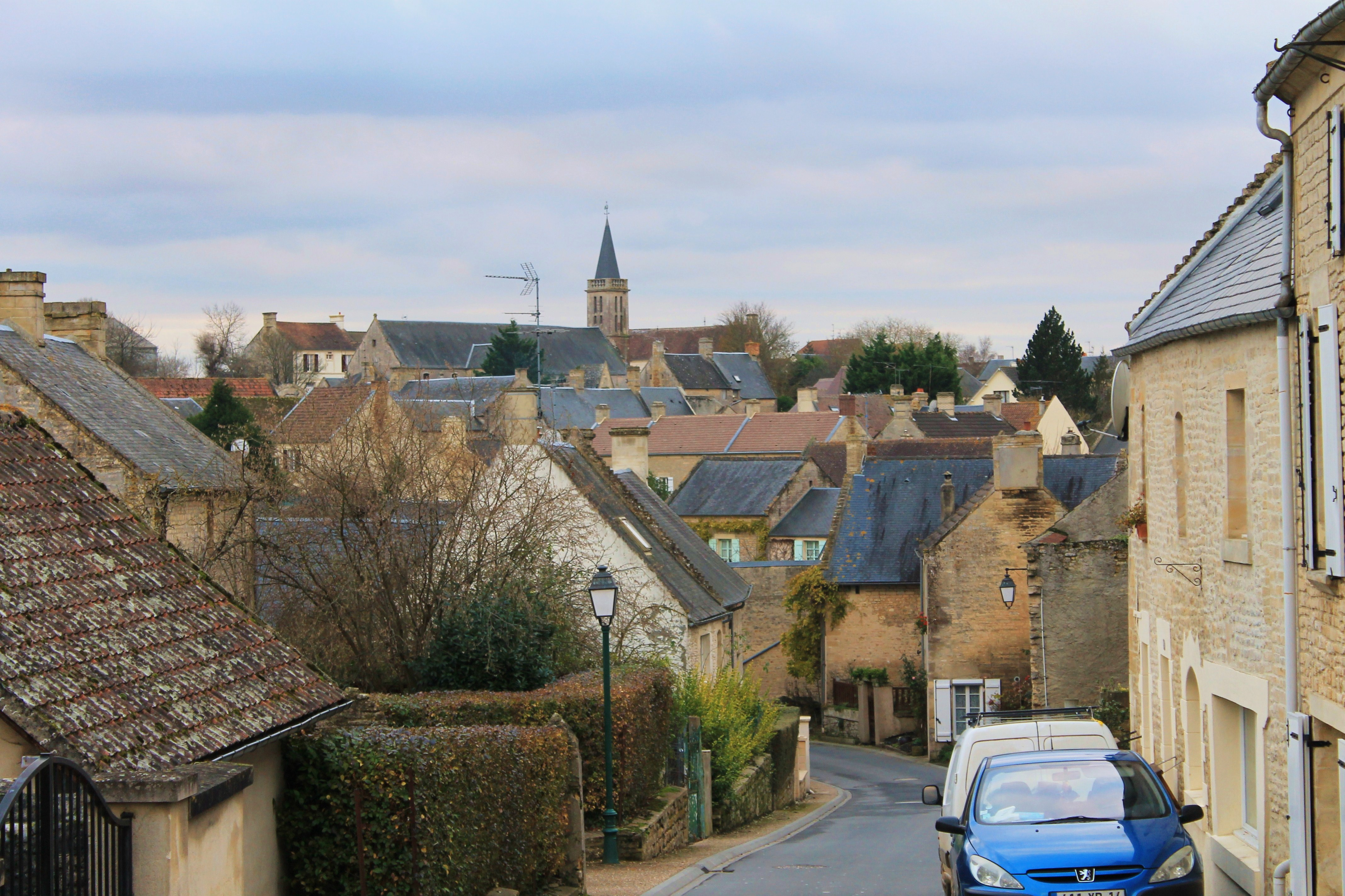 Rue Fleurie à Lantheuil (Calvados)